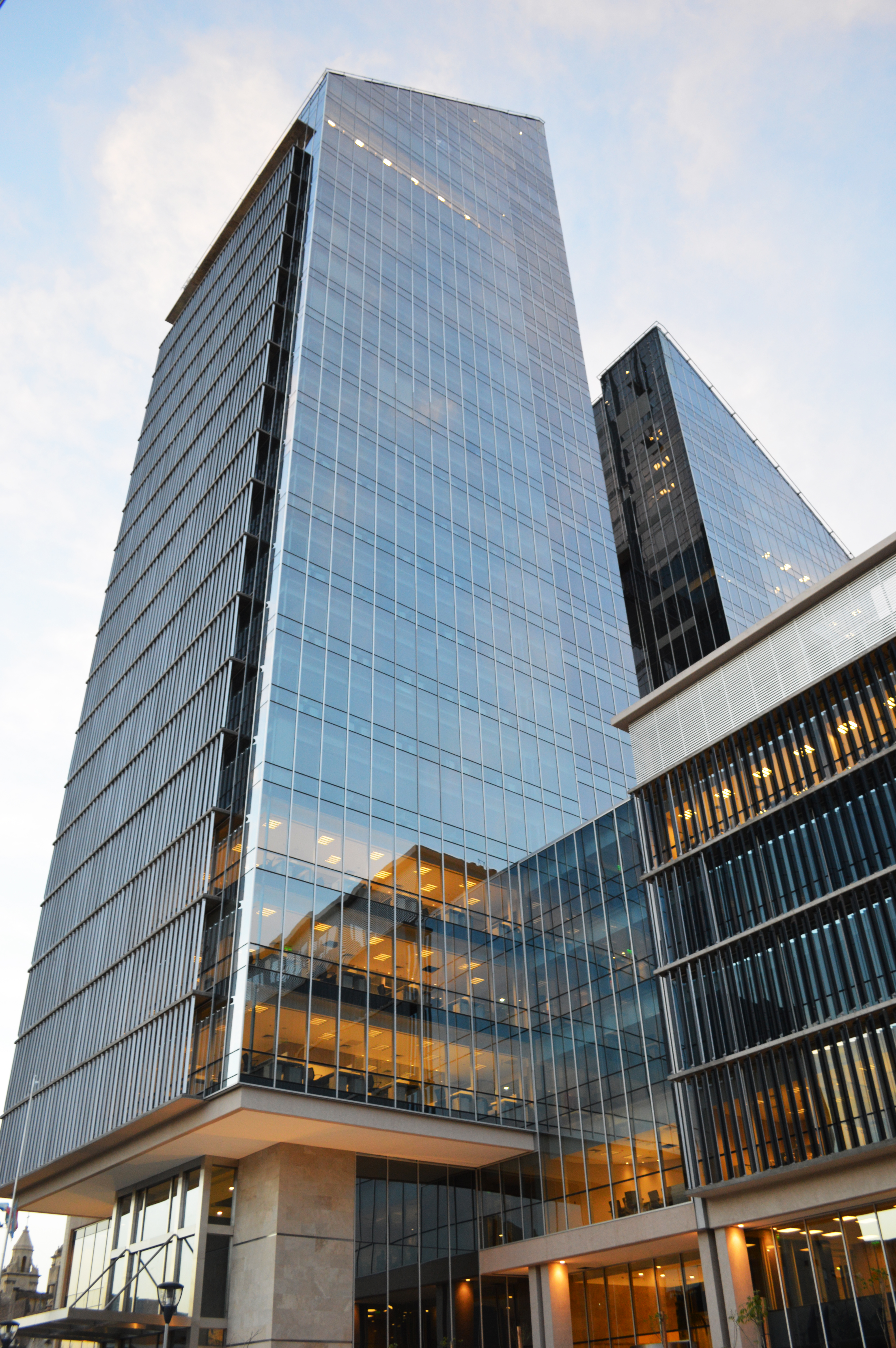 Torre del Ministerio de Economía, de 24 pisos y 105 metros de altura. Posee un mirador desde el cual se puede apreciar toda la ciudad. Está vinculada con la torre del Ministerio de Educación a través de dos puentes aéreos. Es la torre principal del Complejo Juan Felipe Ibarra y la más alta de la ciudad de Santiago del Estero y del Noroeste de Argentina.